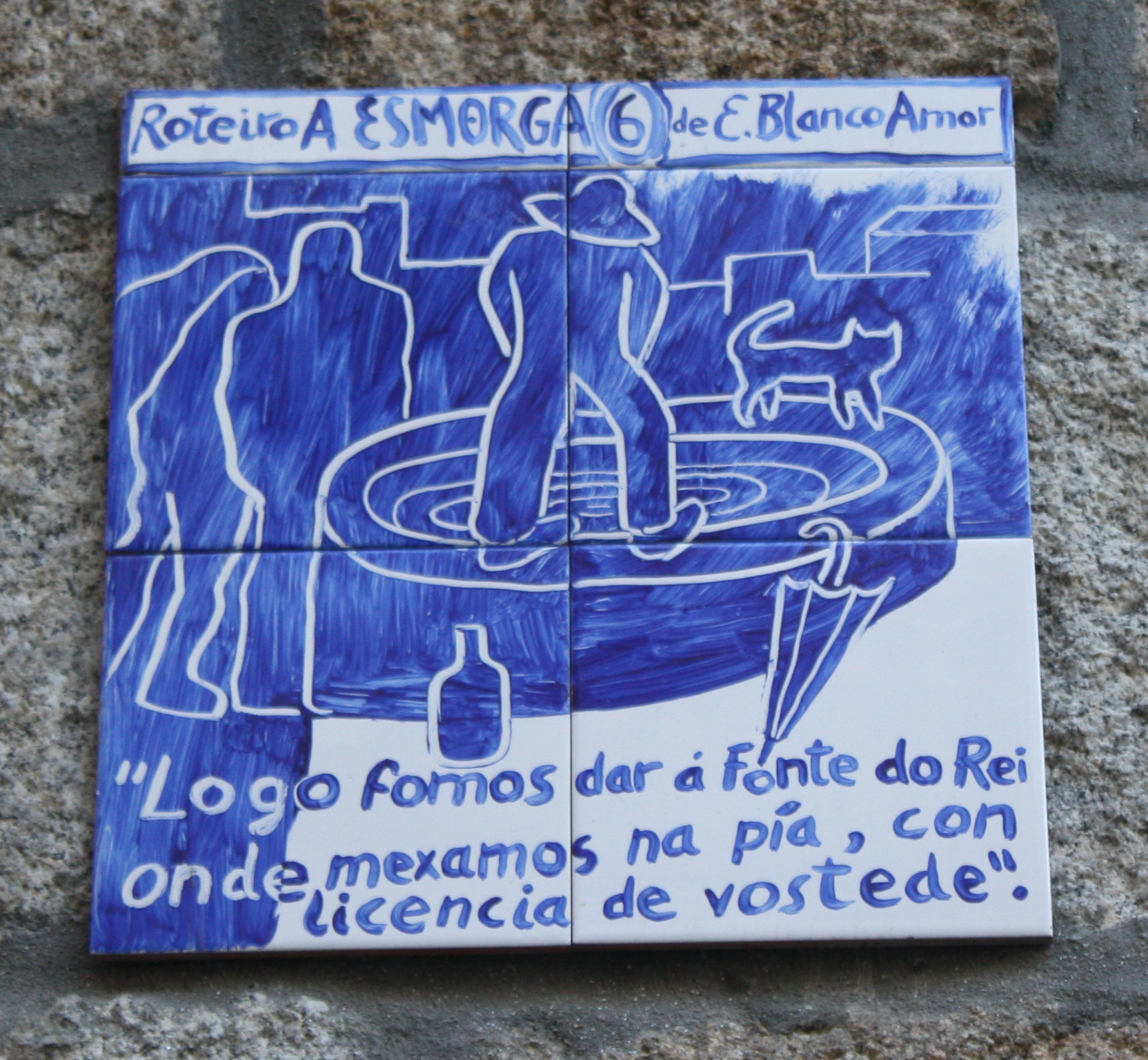 Placa da "sexta estación" da ruta da Esmorga, de Blanco Amor. Fai referencia ó paso pola Fonte do Rei.